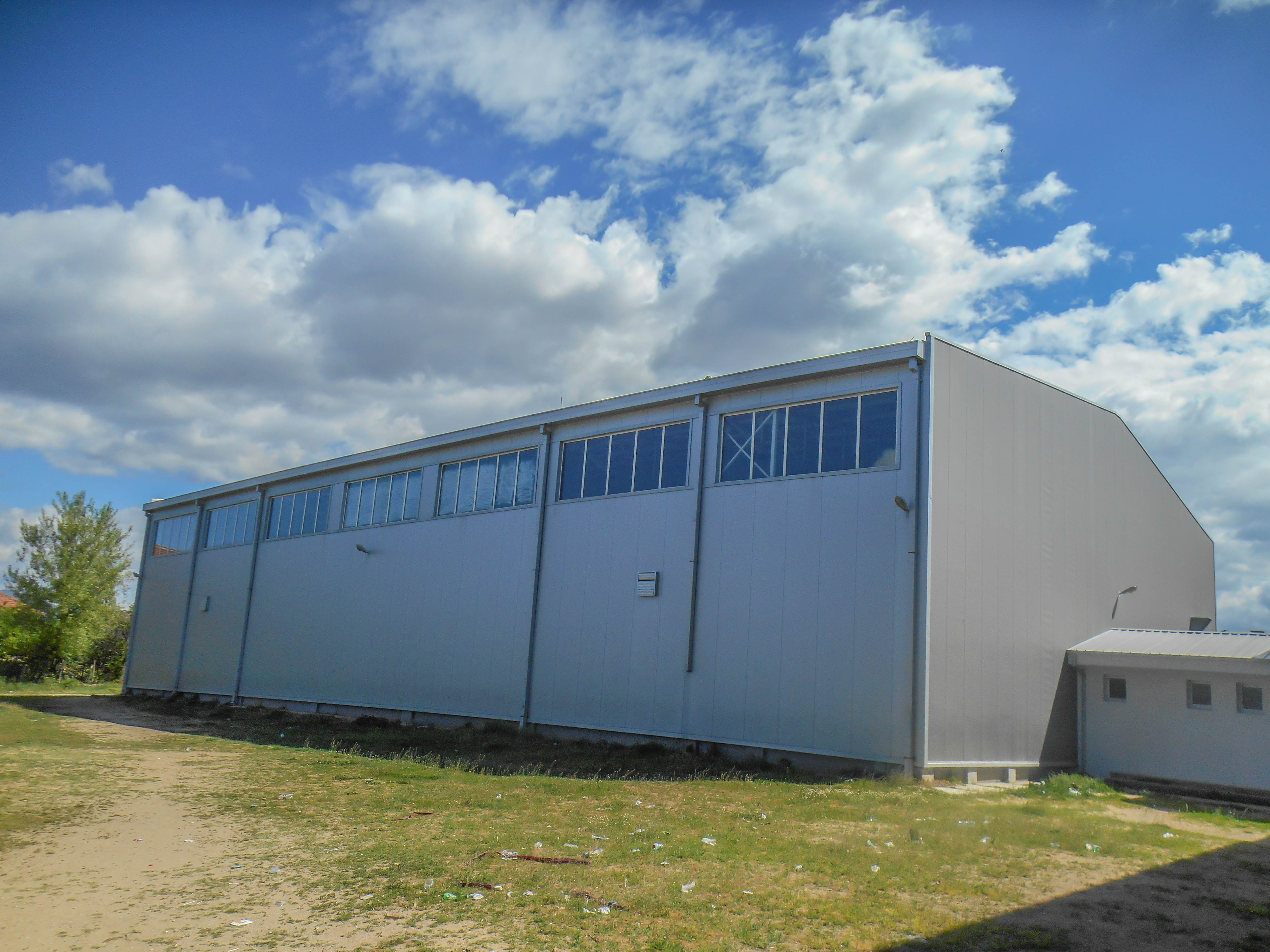 Основно училиште „Гоце Делчев“ - Василево